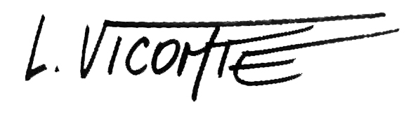 Exemple de signature de Laurent Vicomte